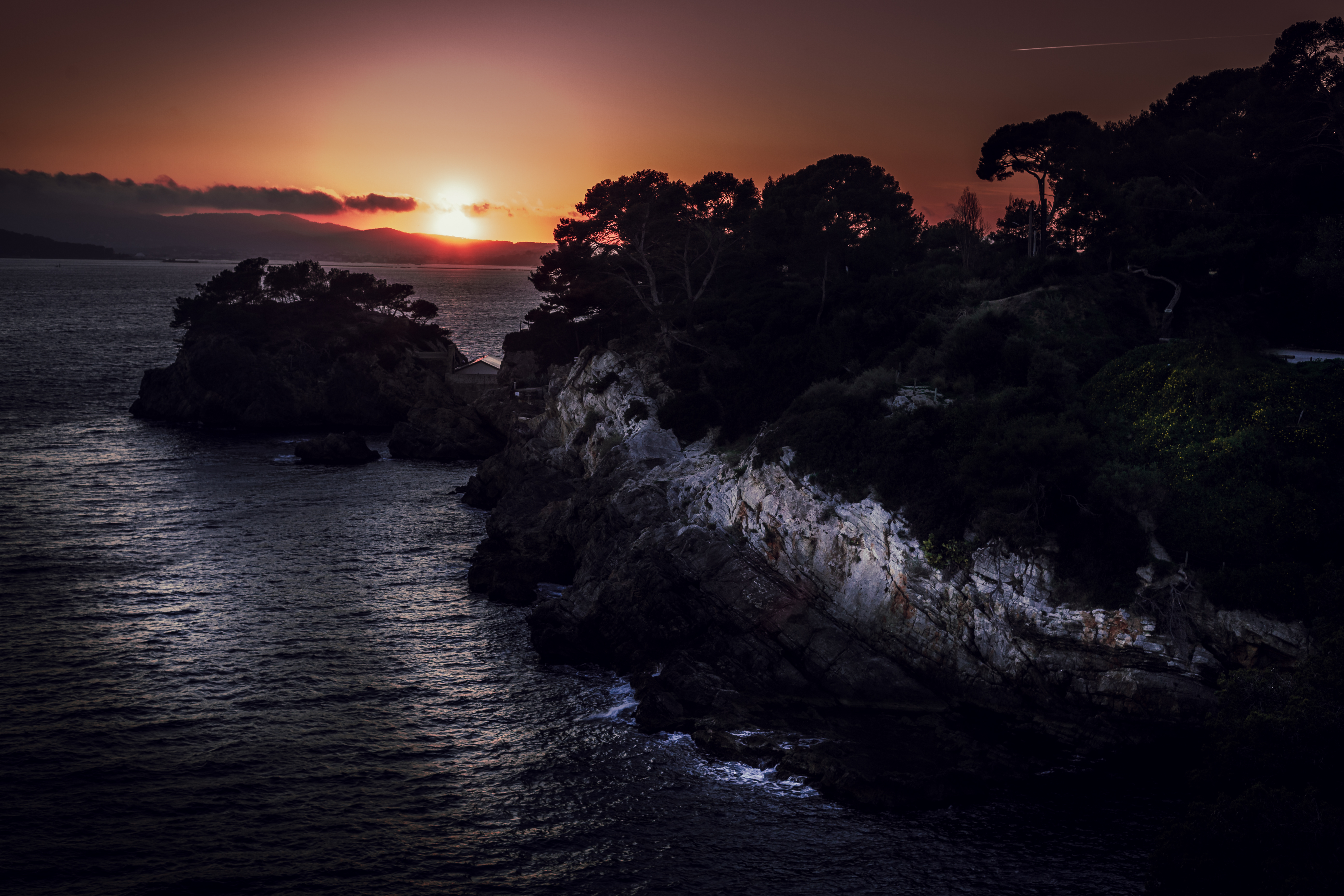 Vue sur la batterie basse, depuis la chapelle Notre-Dame-du-Cap-Falcon.